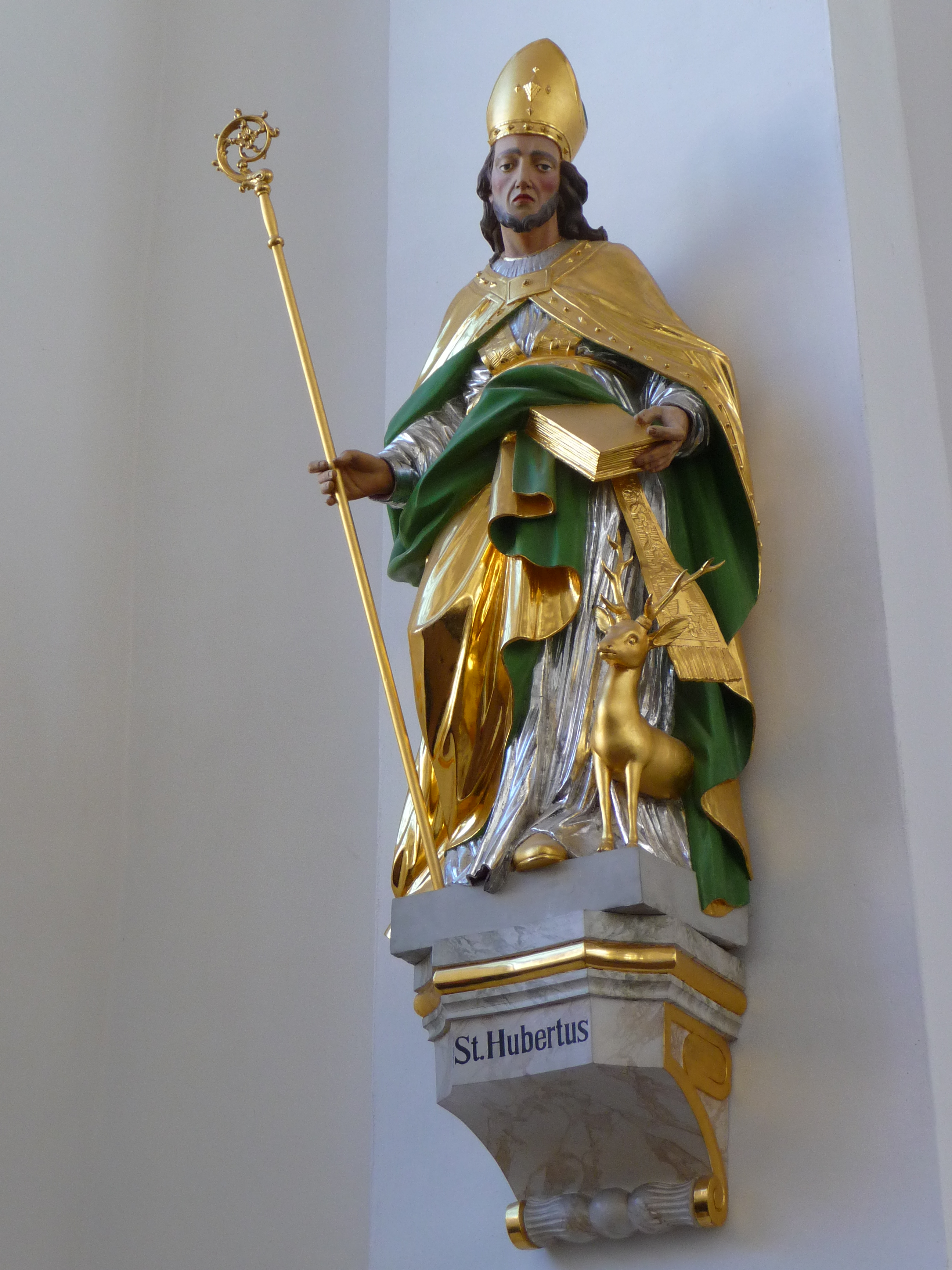 Darstellung St. Hubertus (um 1770), fotografiert in der Jesuitenkirche in der Heidelberger Altstadt, ursprünglich Ausstattung der Heidelberger Karmelitenkirche (Baden-Württemberg, Deutschland)